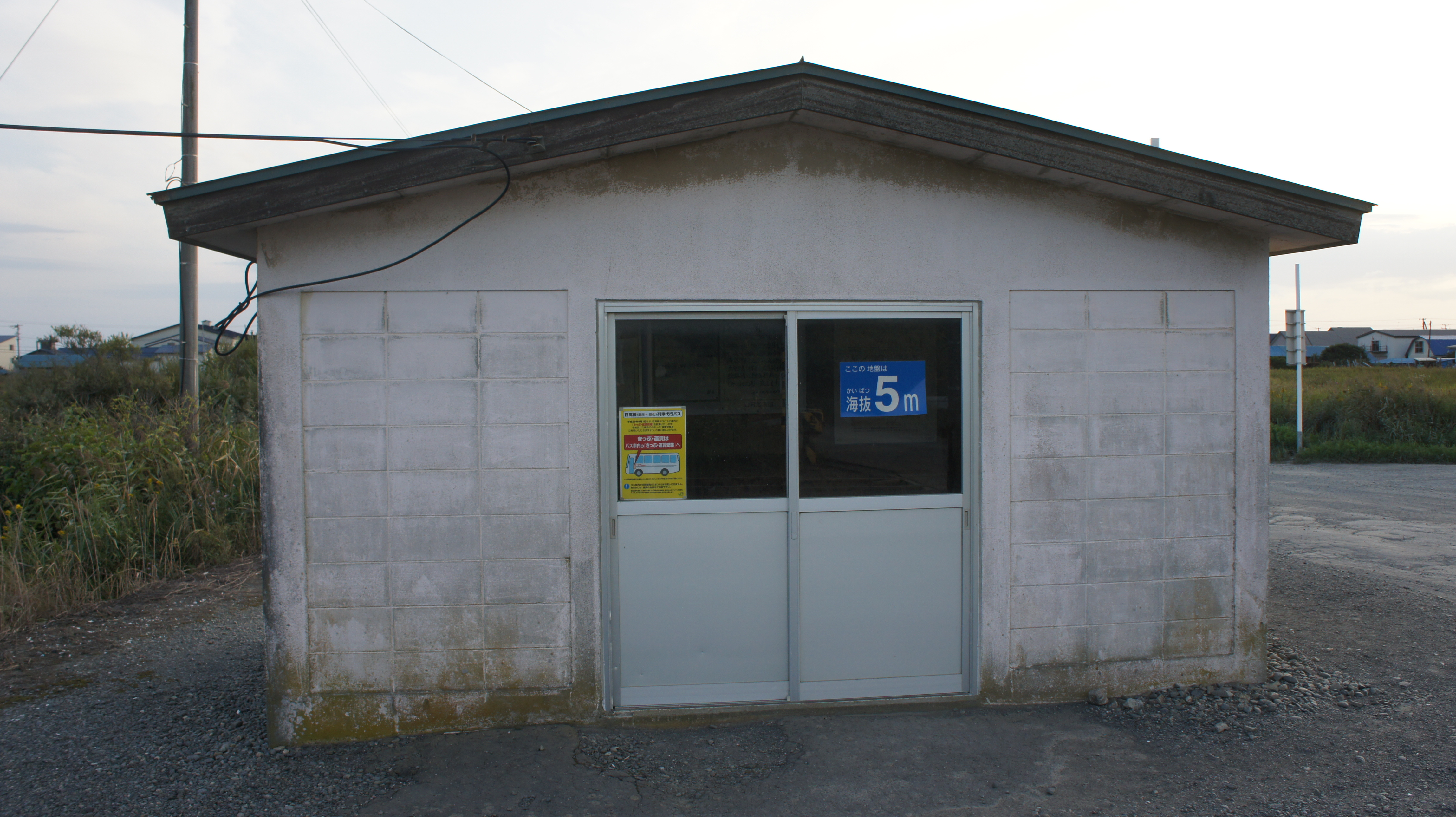 JR日高本線・汐見駅の待合所